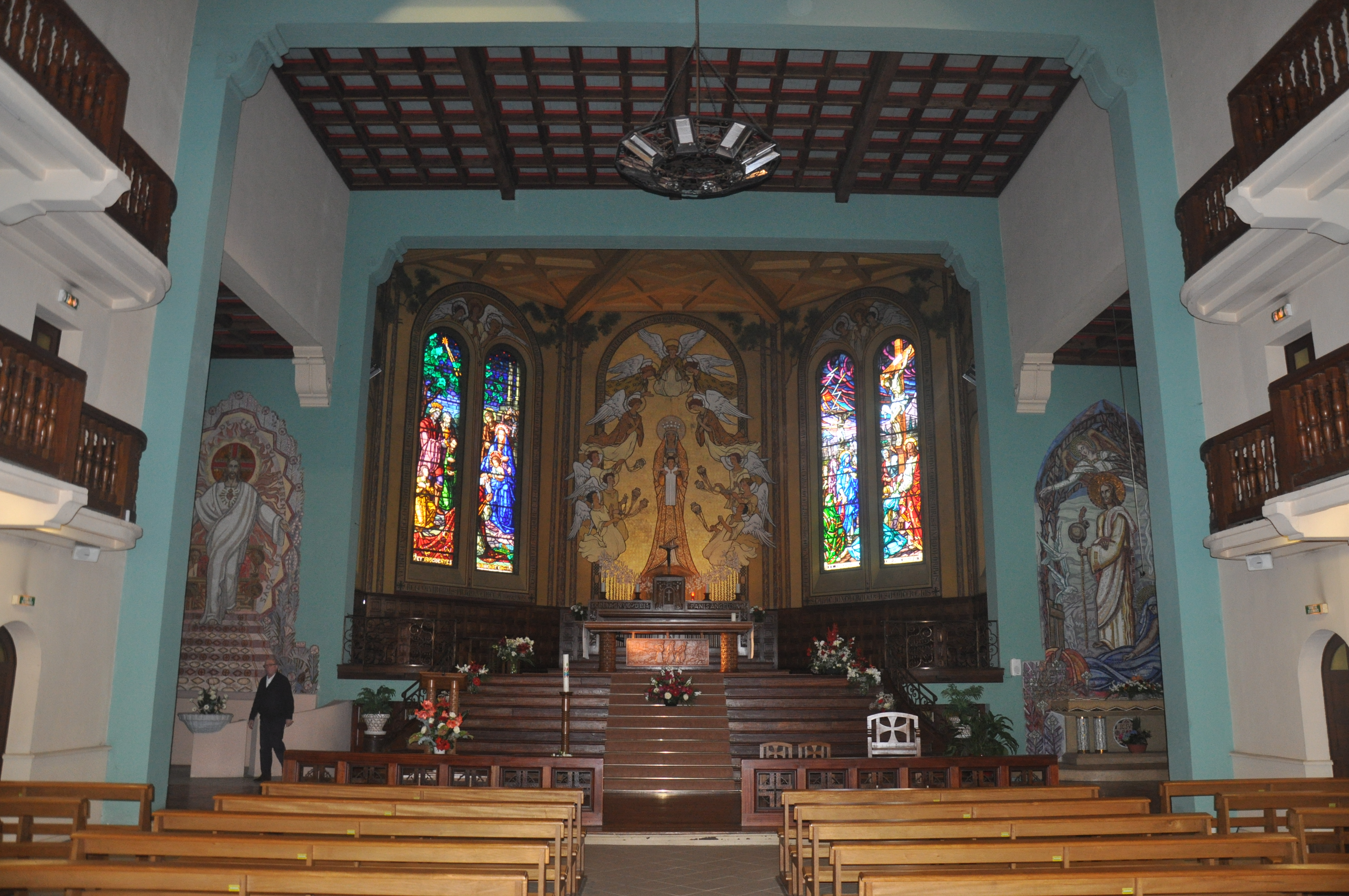 Eglise Sainte-Marie Anglet (intérieur)